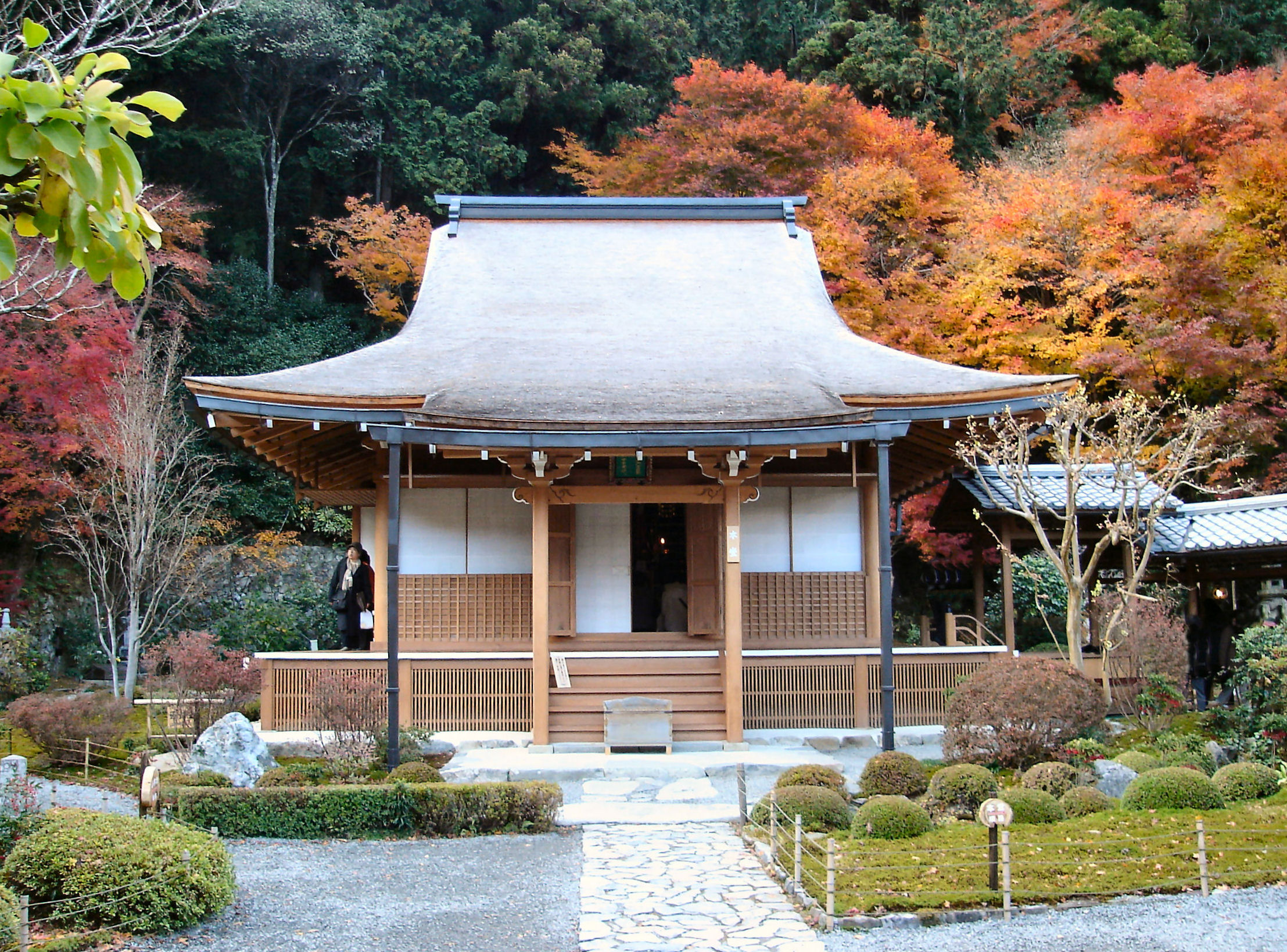 Jakkouin hondo , kyoto japan